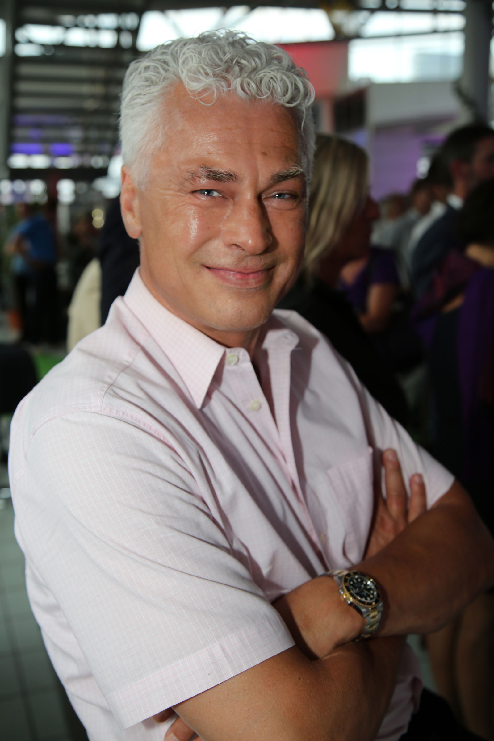 Polster_Toni-7361-fmp